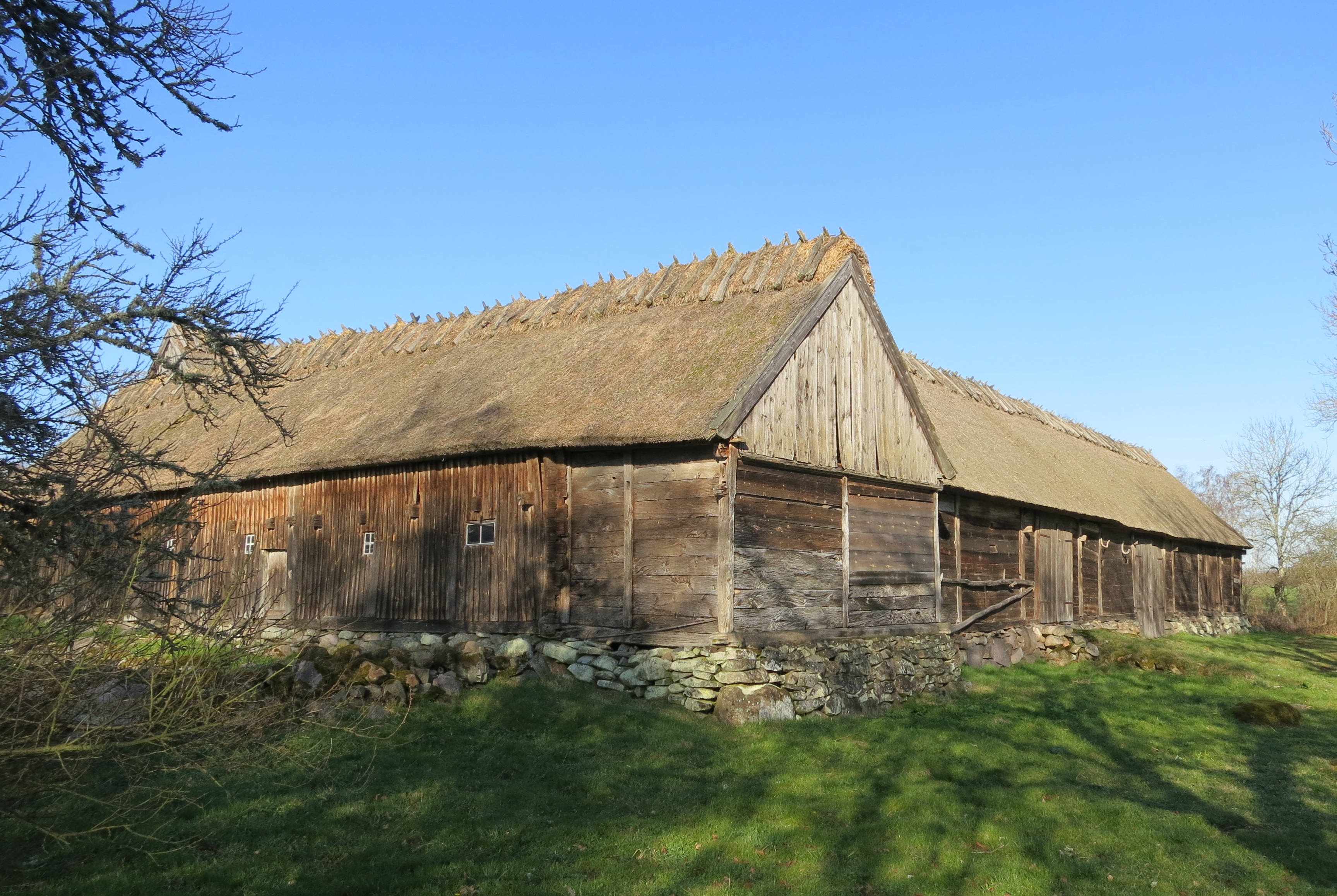 Ballingstorpsgården